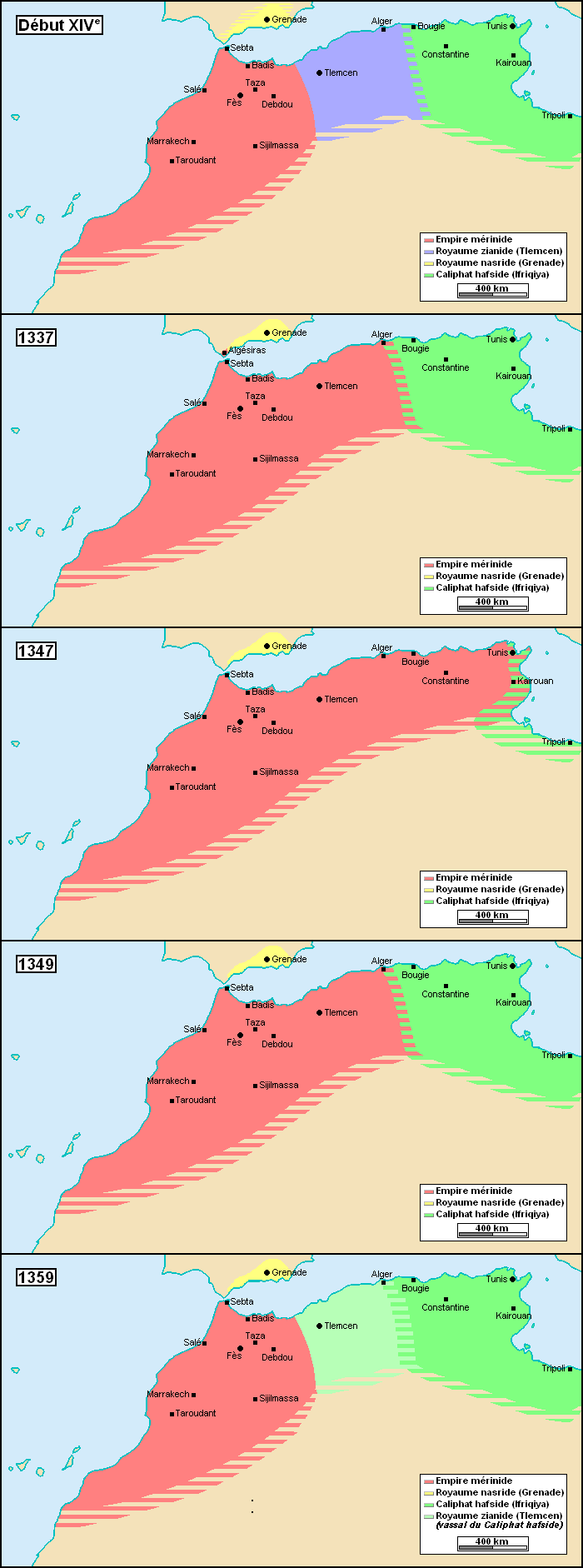 Chronologie de l'Empire mérinide, en cartes